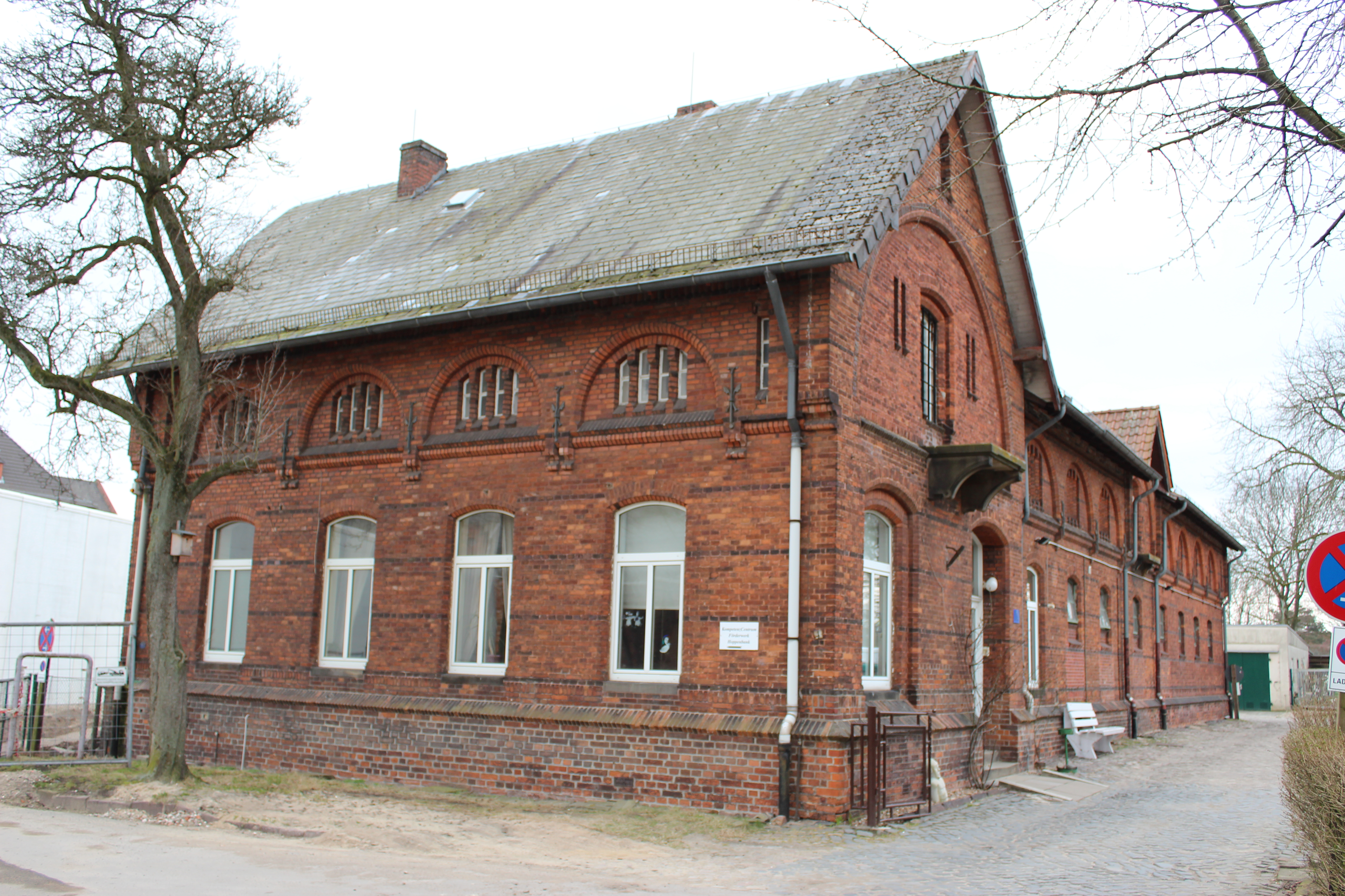 Strafanstalt Oslebshausen, Meierei, Justizvollzugsanstalt Oslebshausen in Bremen, Sonnemannstraße 4. Das abgebildete Objekt ist ein geschütztes Kulturdenkmal in der Freien Hansestadt Bremen, mit der Nr. 1351 beim Landesamt für Denkmalpflege registriert.